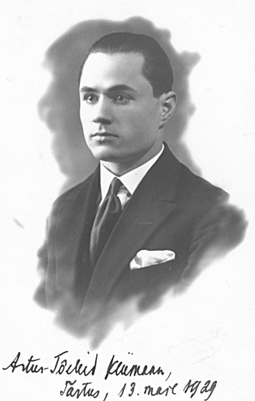 Artur-Tõeleid Kliimann